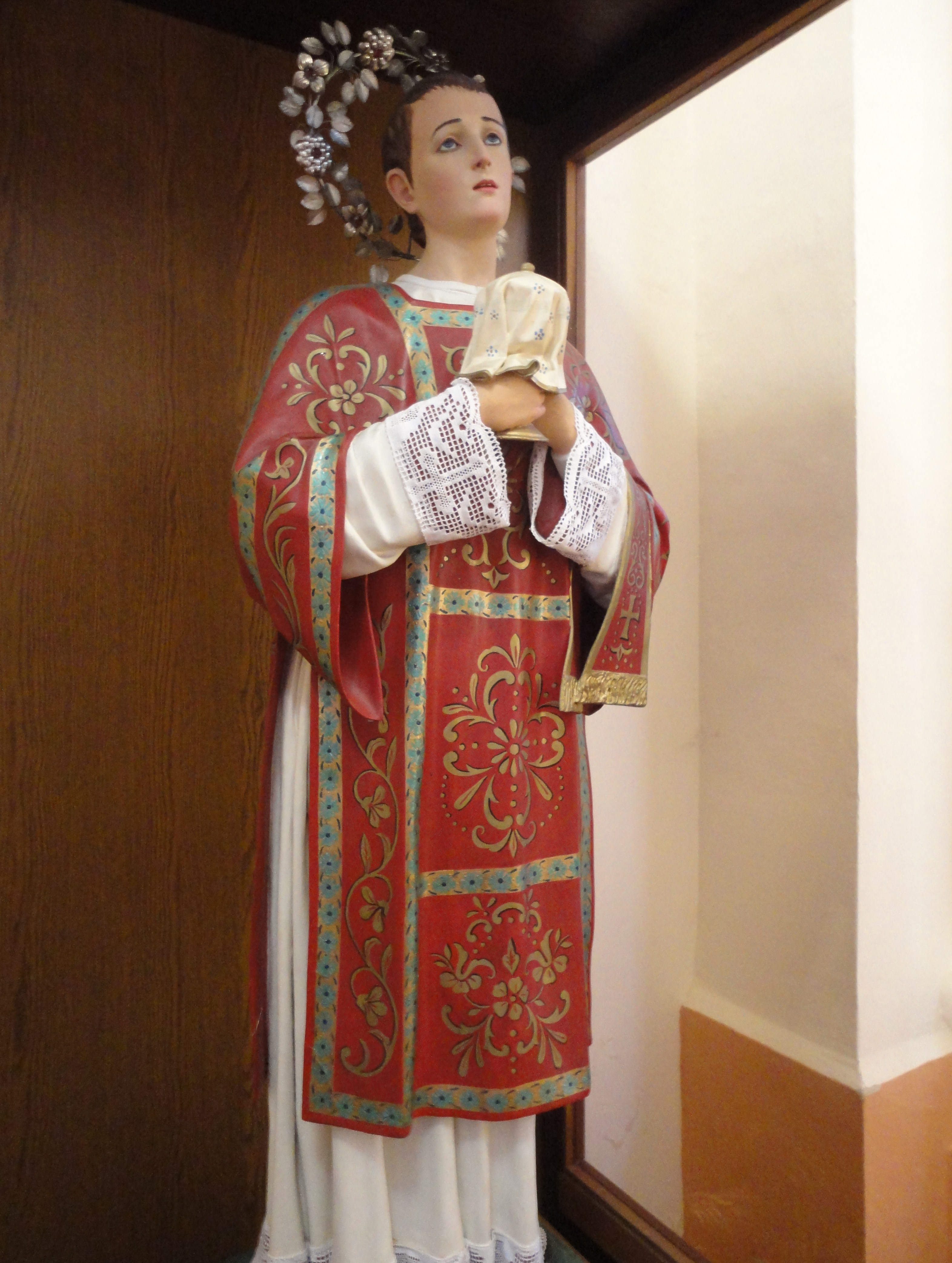 Statua di San Dana venerata a San Dana (Lecce)